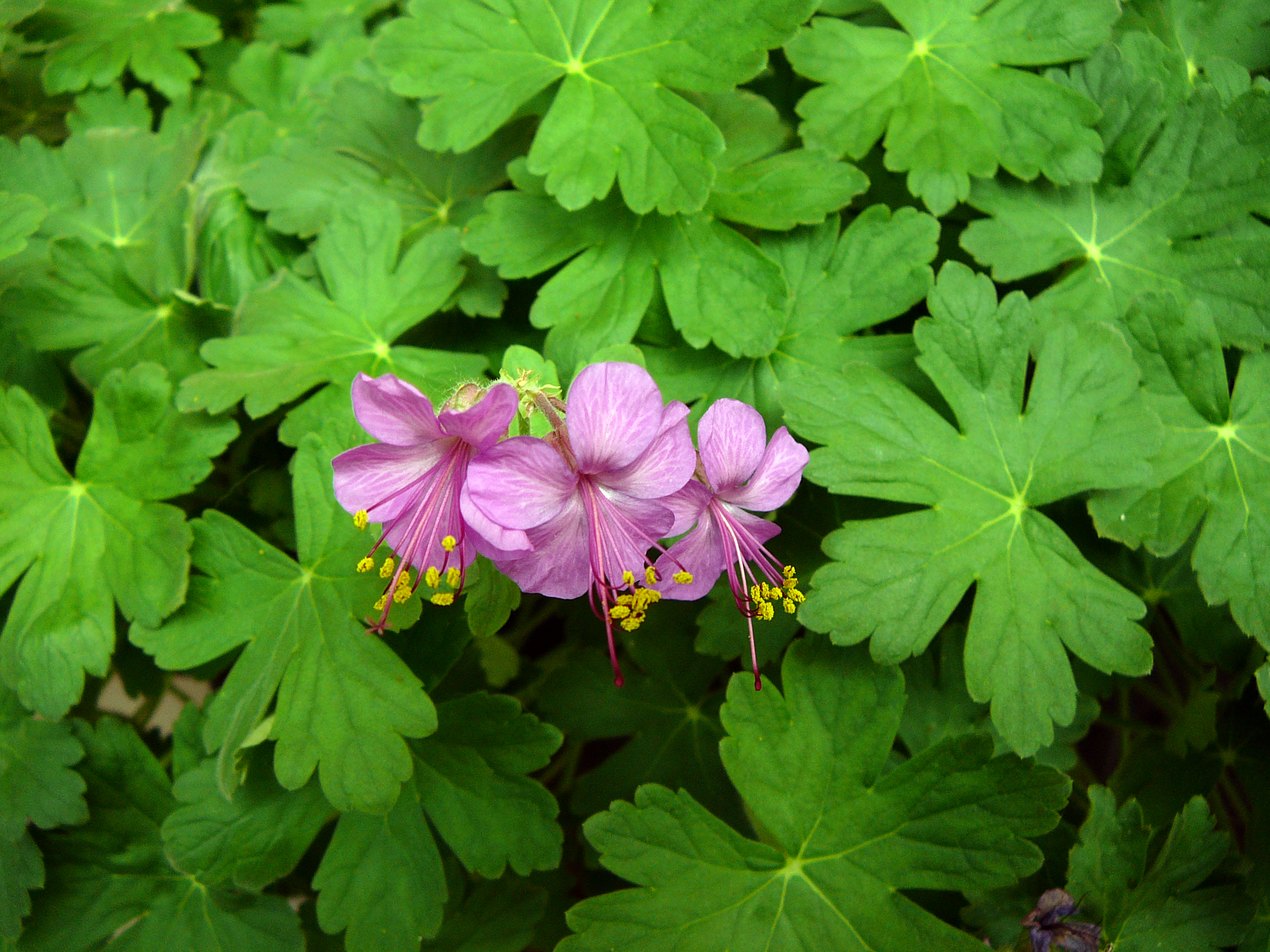 geranium